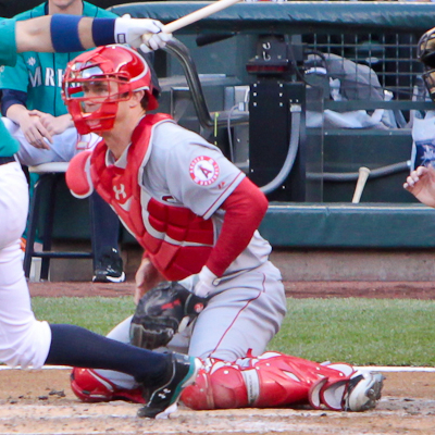 John Hester